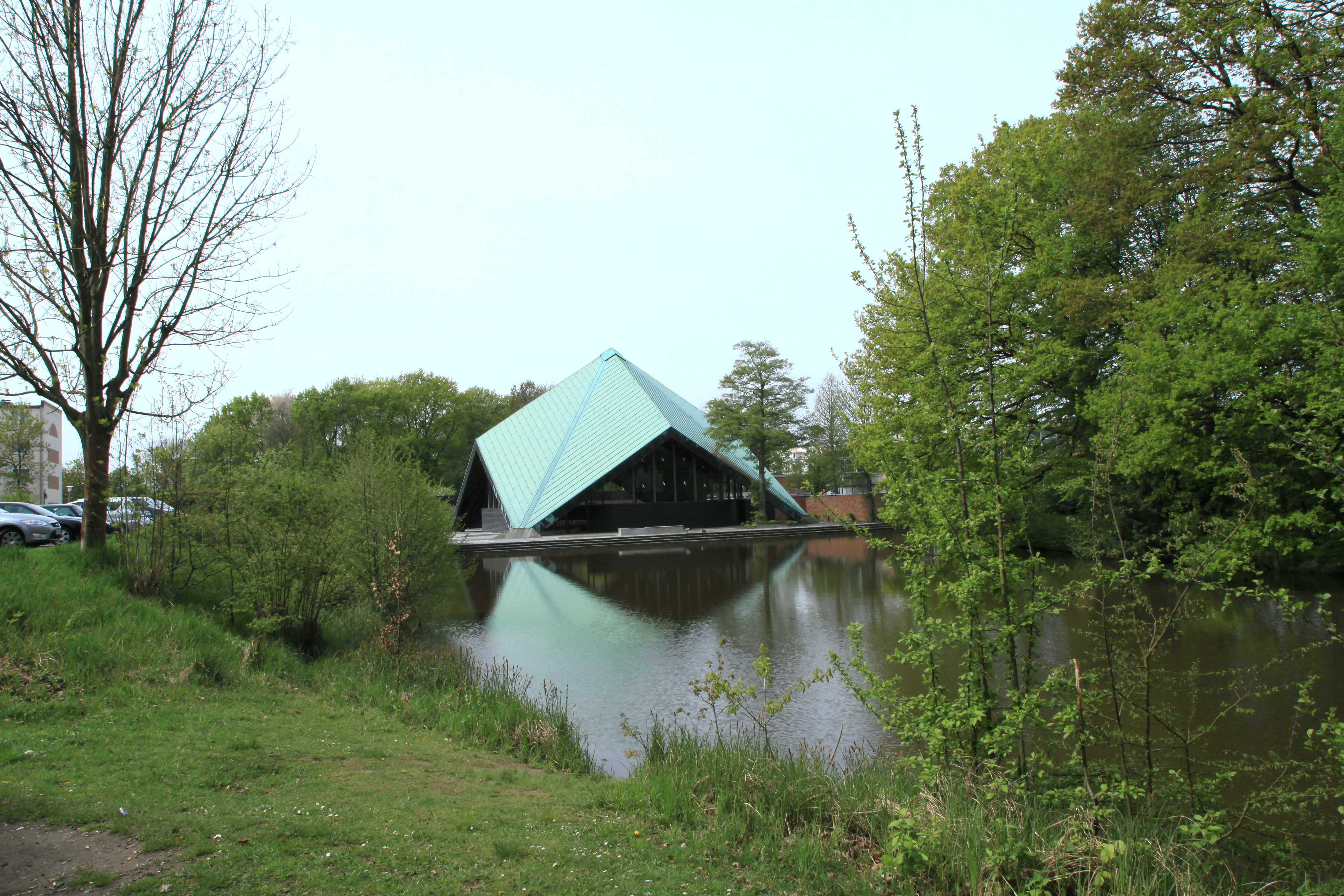 Evangelische Kirche Kippekausen, Am Rittersteg in Refrath, Bergisch Gladbach